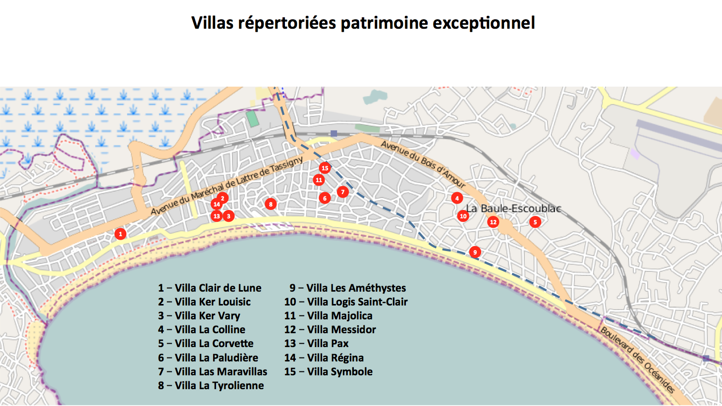 La Baule - Escoublac : plan des villas classées patrimoine exceptionnel